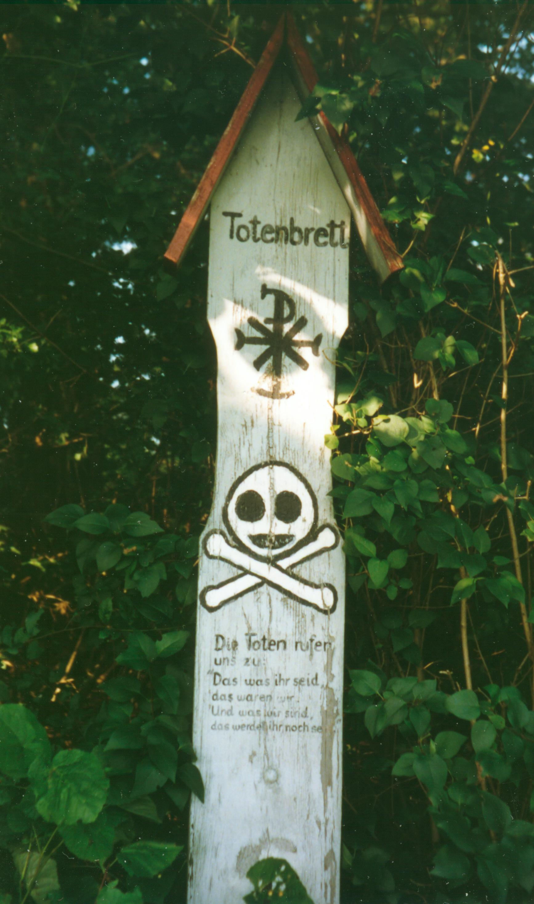 Totengedenkbrett bei Grafrath, Landkreis Fürstenfeldbruck, Oberbayern